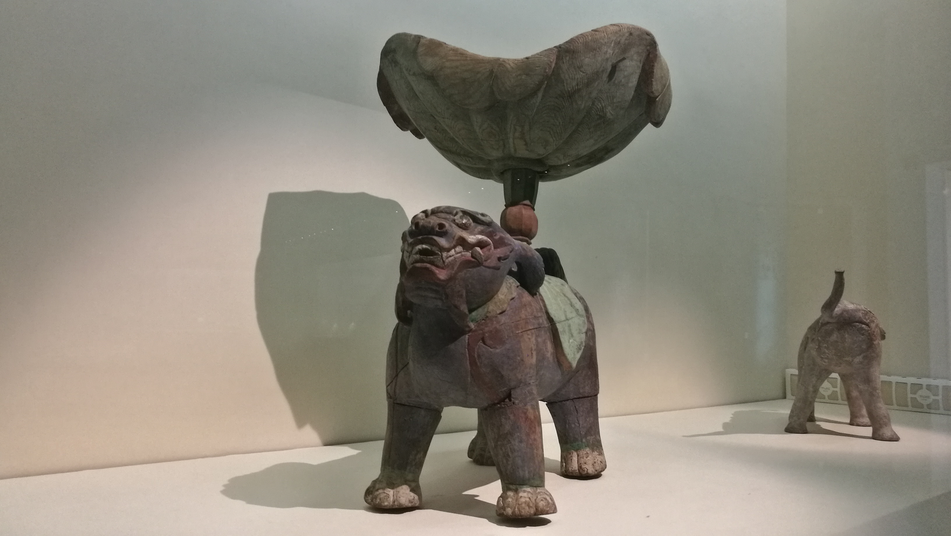 조선시대 18세기 불교 의식에 사용되던 법고를 설치하기 위한 대좌. (경기도 박물관 소장)